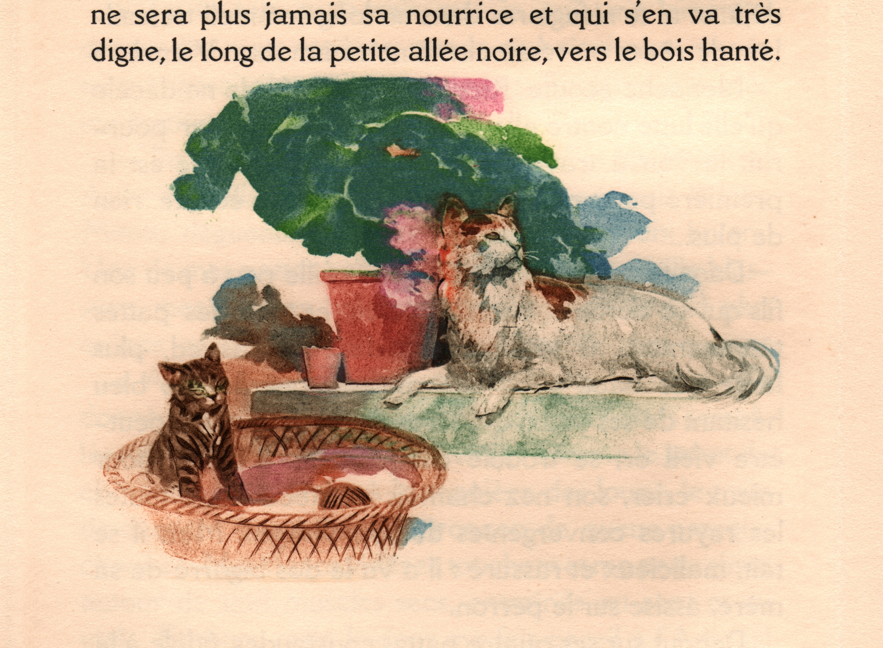 Illustration par René Lelong, page 40 du livre de Colette Les Vrilles de la vigne, en tête du chapitre Nonoche. Éditions Kra.